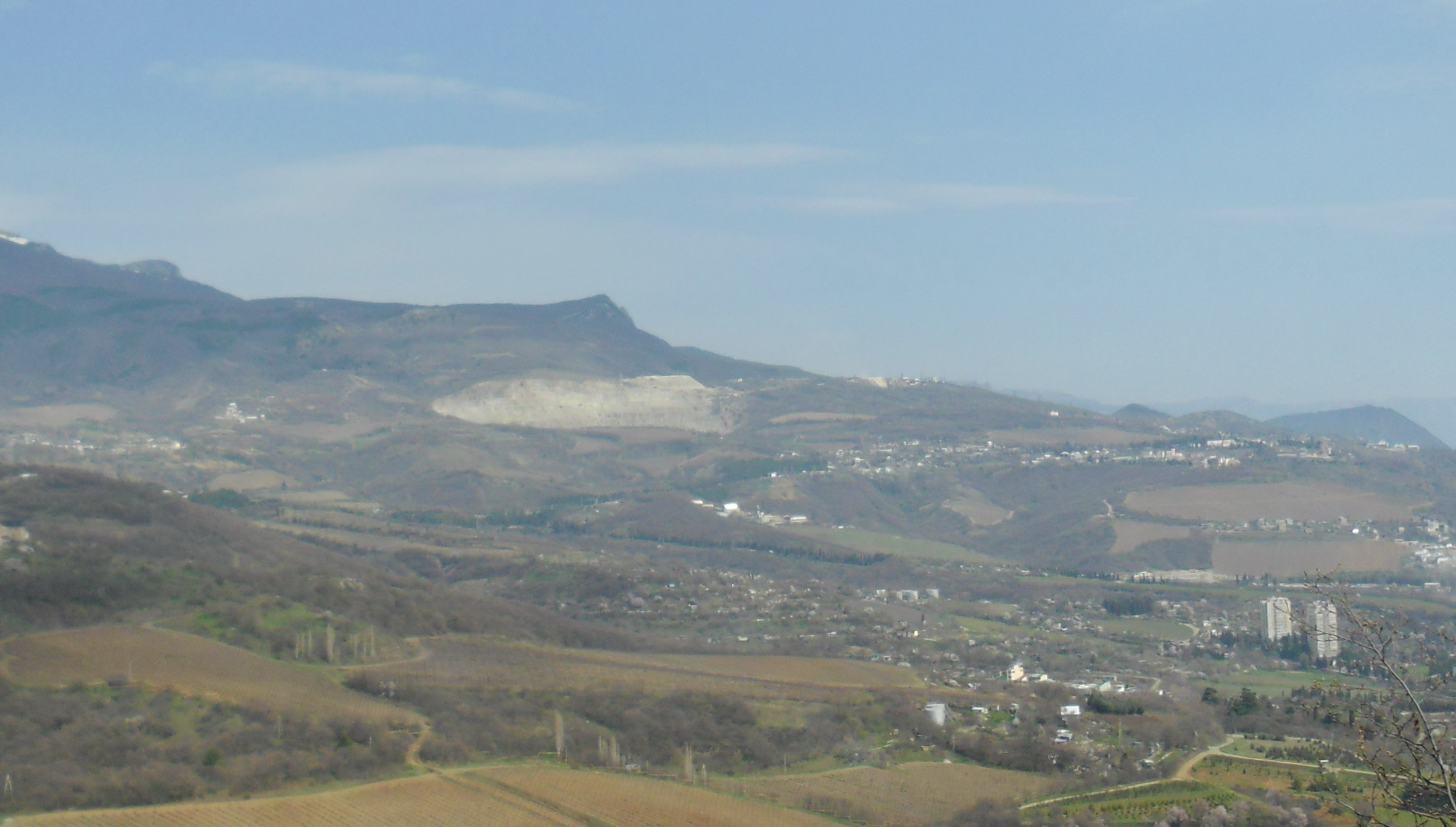 Шархинський кар'єр.